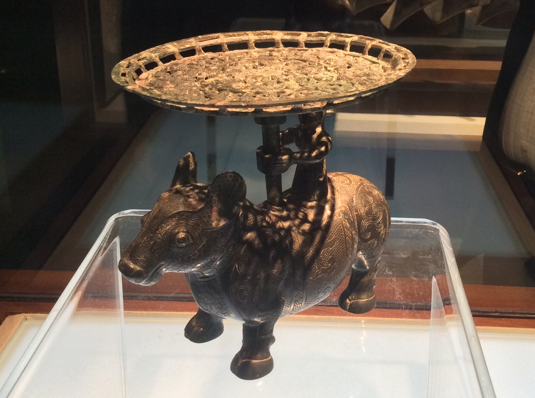 銅牺立人擎盤 戰國, 山西長治市分水嶺126號墓出土